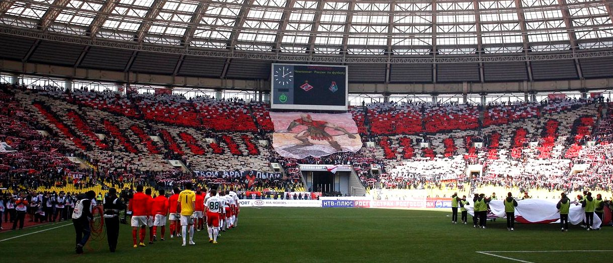 Перфоманс "Твой враг в пыли, жалок и слаб" на матче с "Локомотивом". 2010 год